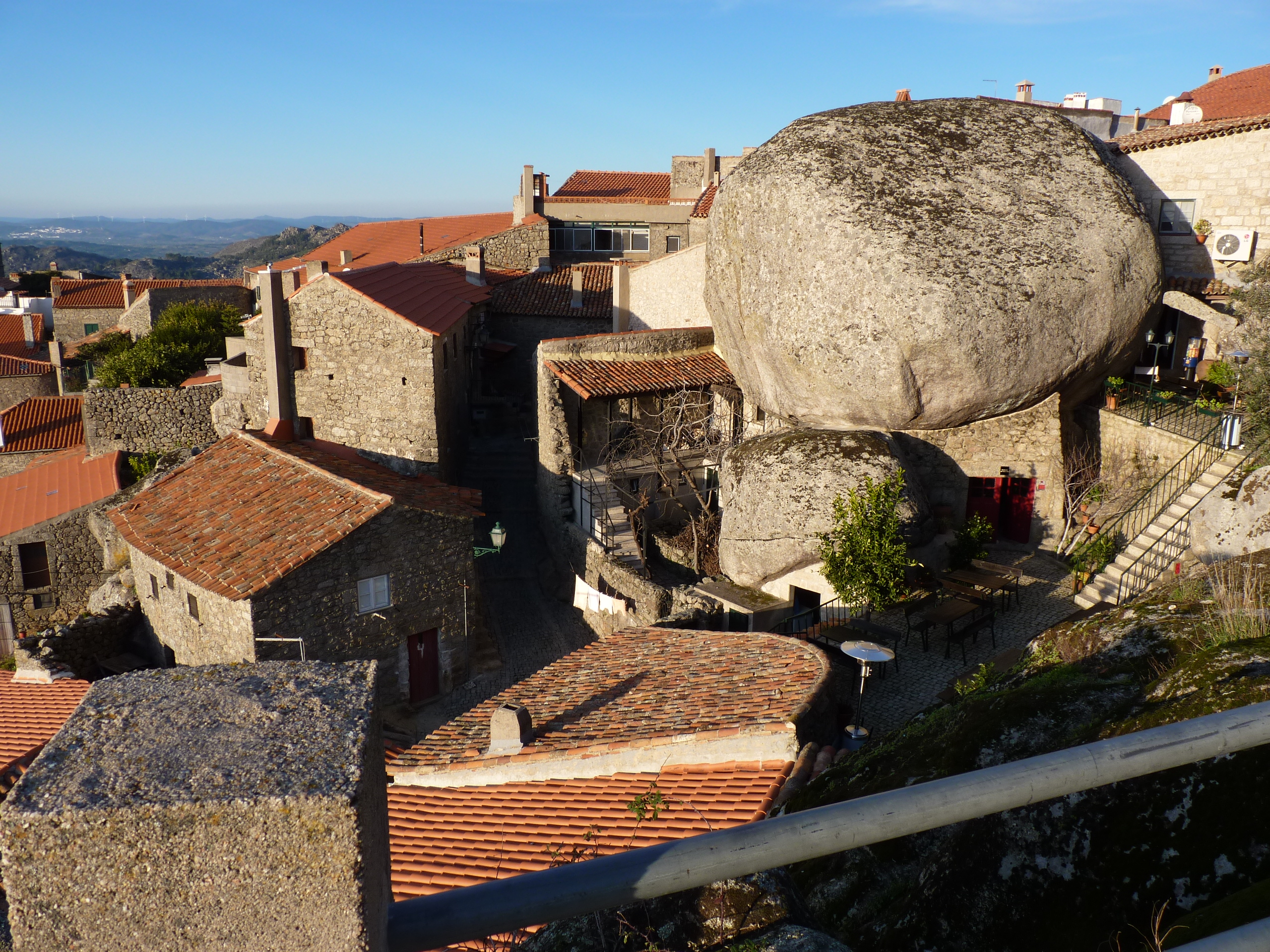 Aldeia Velha de Monsanto This monument is classified as Imóvel de Interesse Público. This file was uploaded for Wiki Loves Monuments in Portugal with the unique identifier 74233.